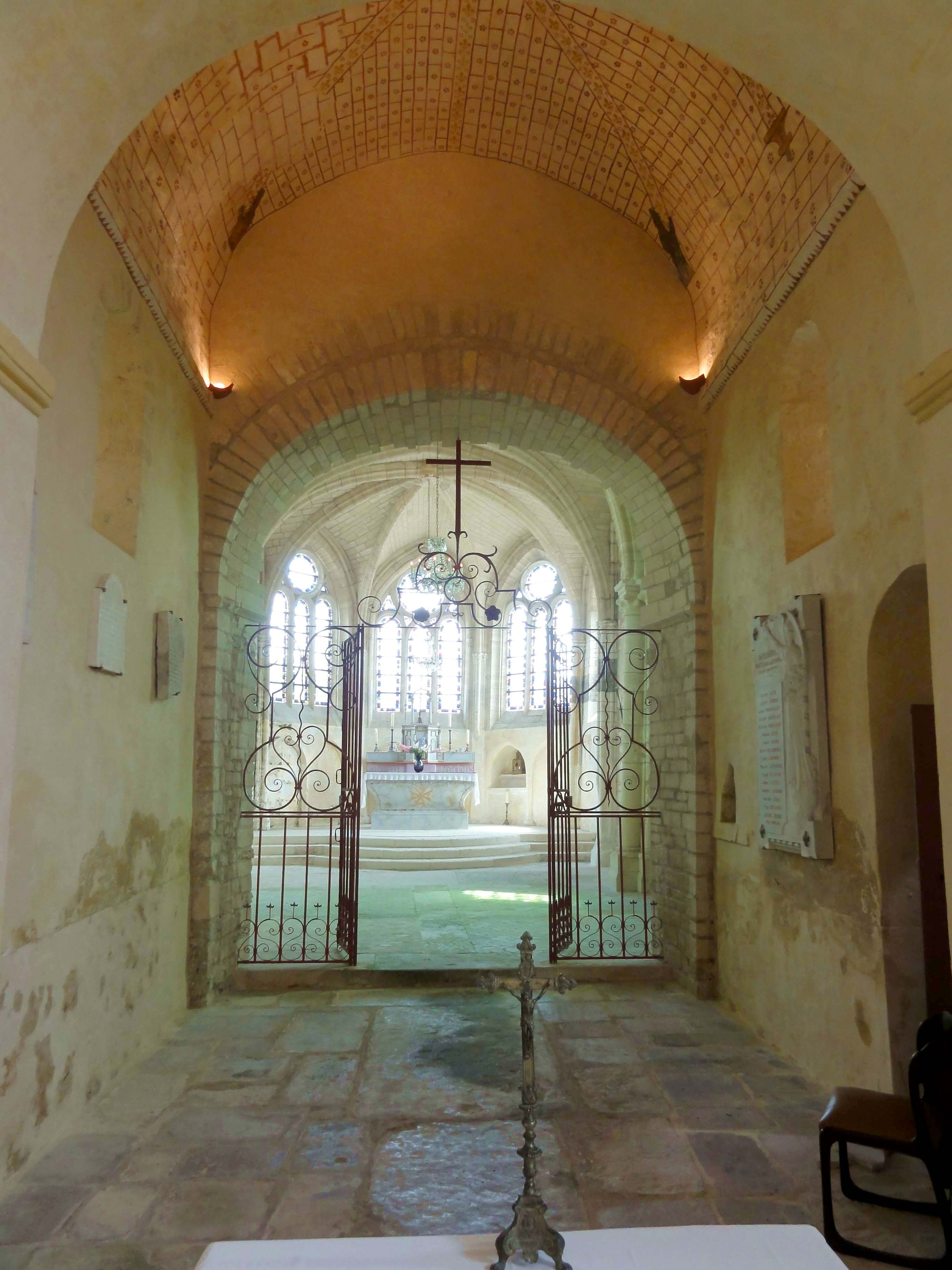 Intérieur de l'église (voir titre).